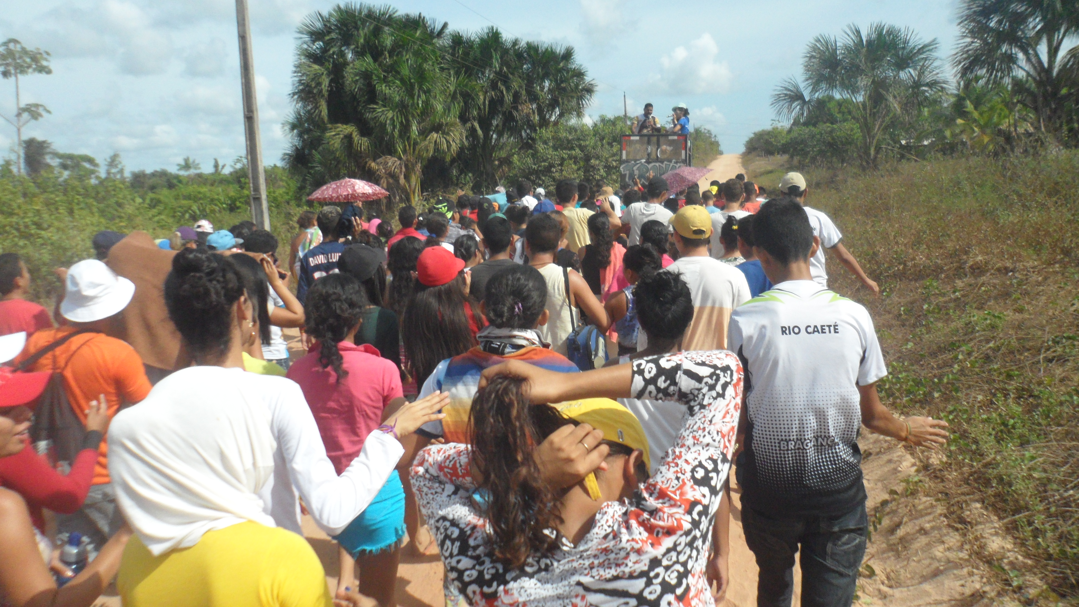 2ª Caminhada da Juventude Paroquial.